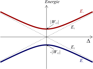 Energien im gestörten QM-Zweizustandssystem